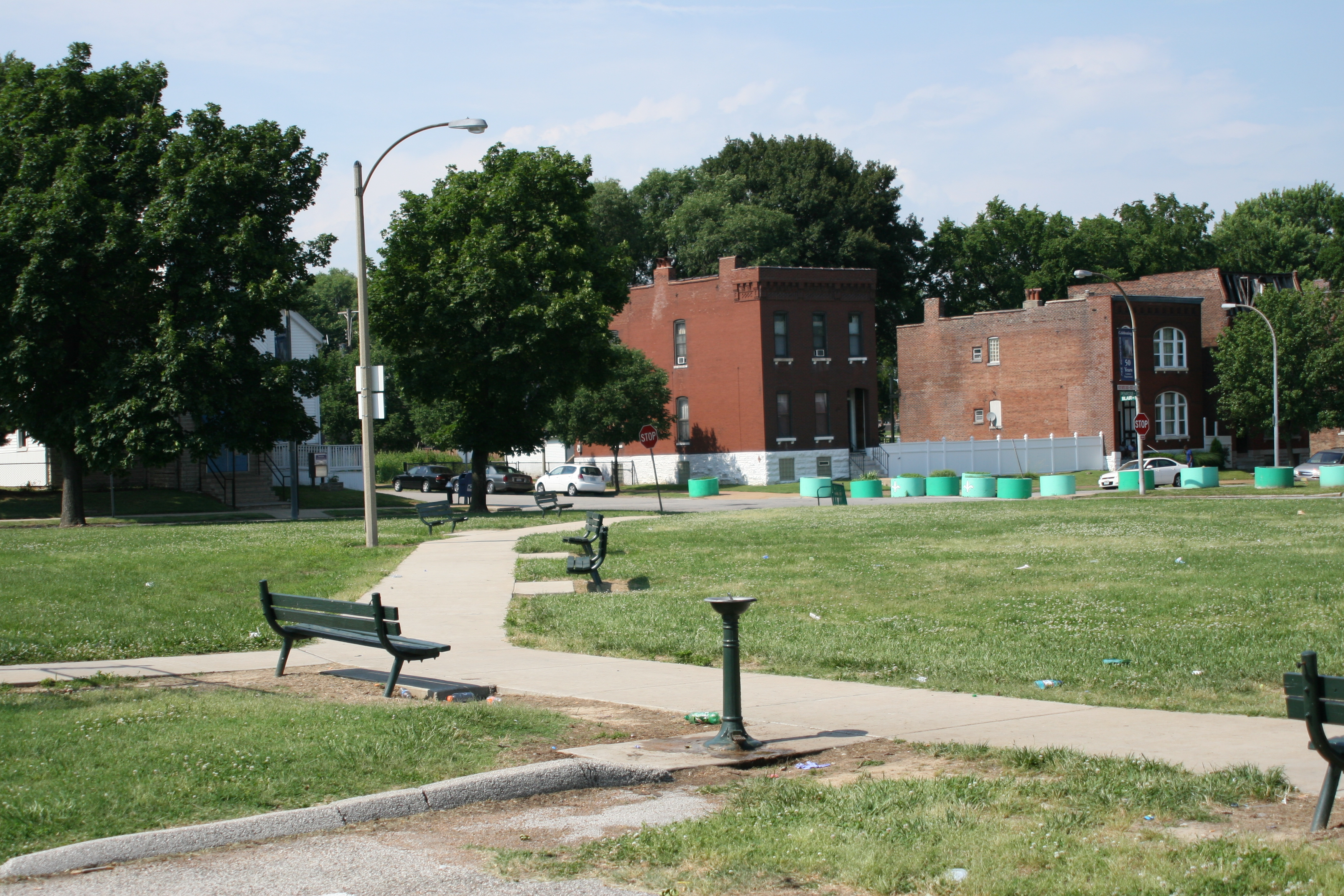 Windsor Park